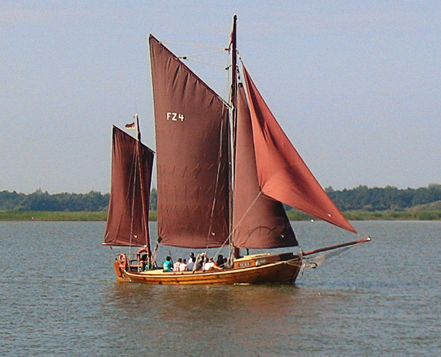 Beschreibung: Zeesenboot auf dem Darßer Bodden bei Wustrow Fotograf: Darkone, 4. August 2004